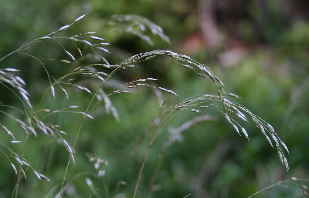 Drahtschmiele (Deschampsia flexuosa), Süßgräser (Poaceae) - Österreich/Austria/Autriche: Oberösterreich, Hausruckviertel, ca. 2.6 km NE Forsthaus Redltal, ca. 670 m s.m.